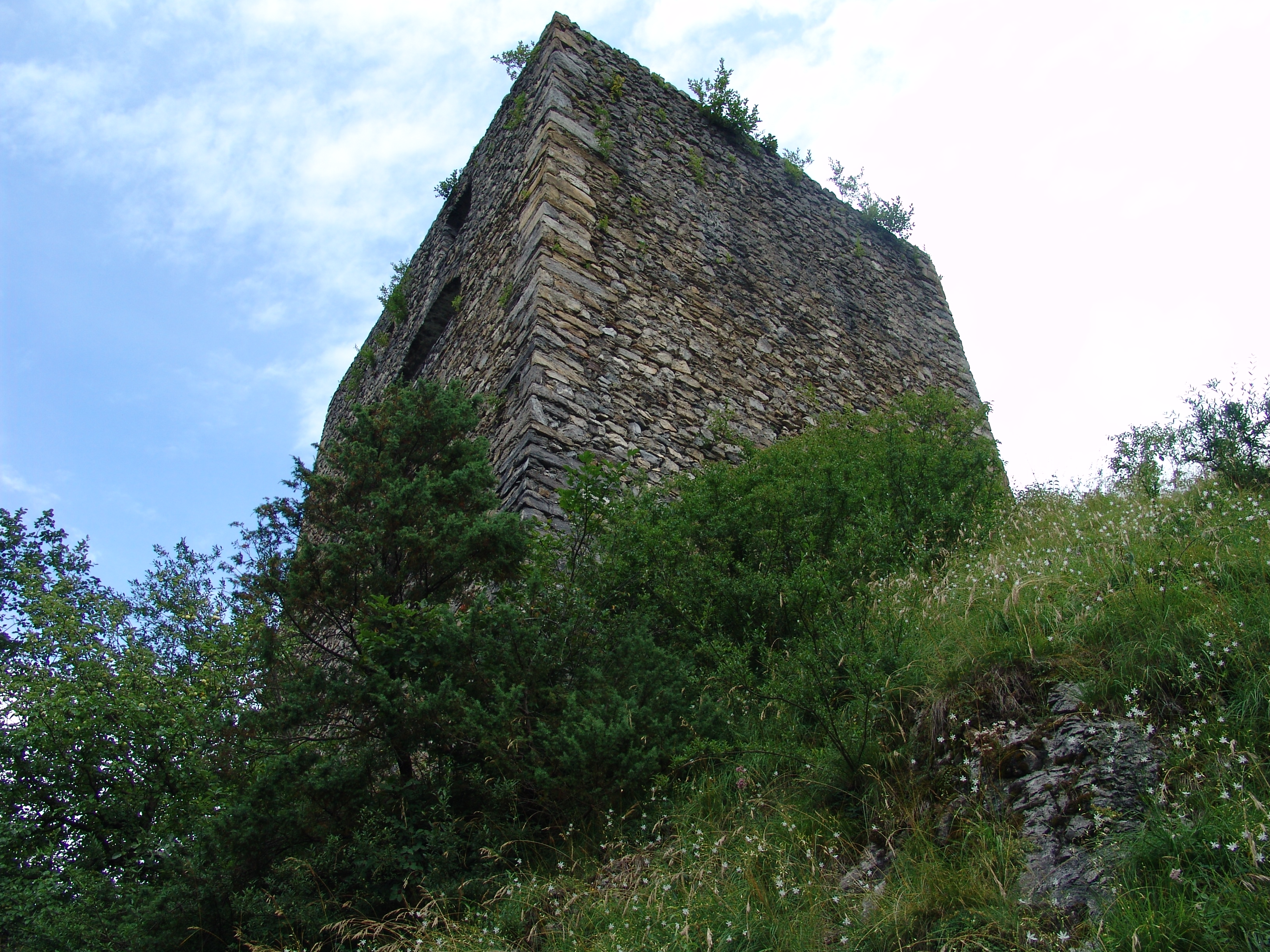 Felsenburg (Kandergrund), Switzerland